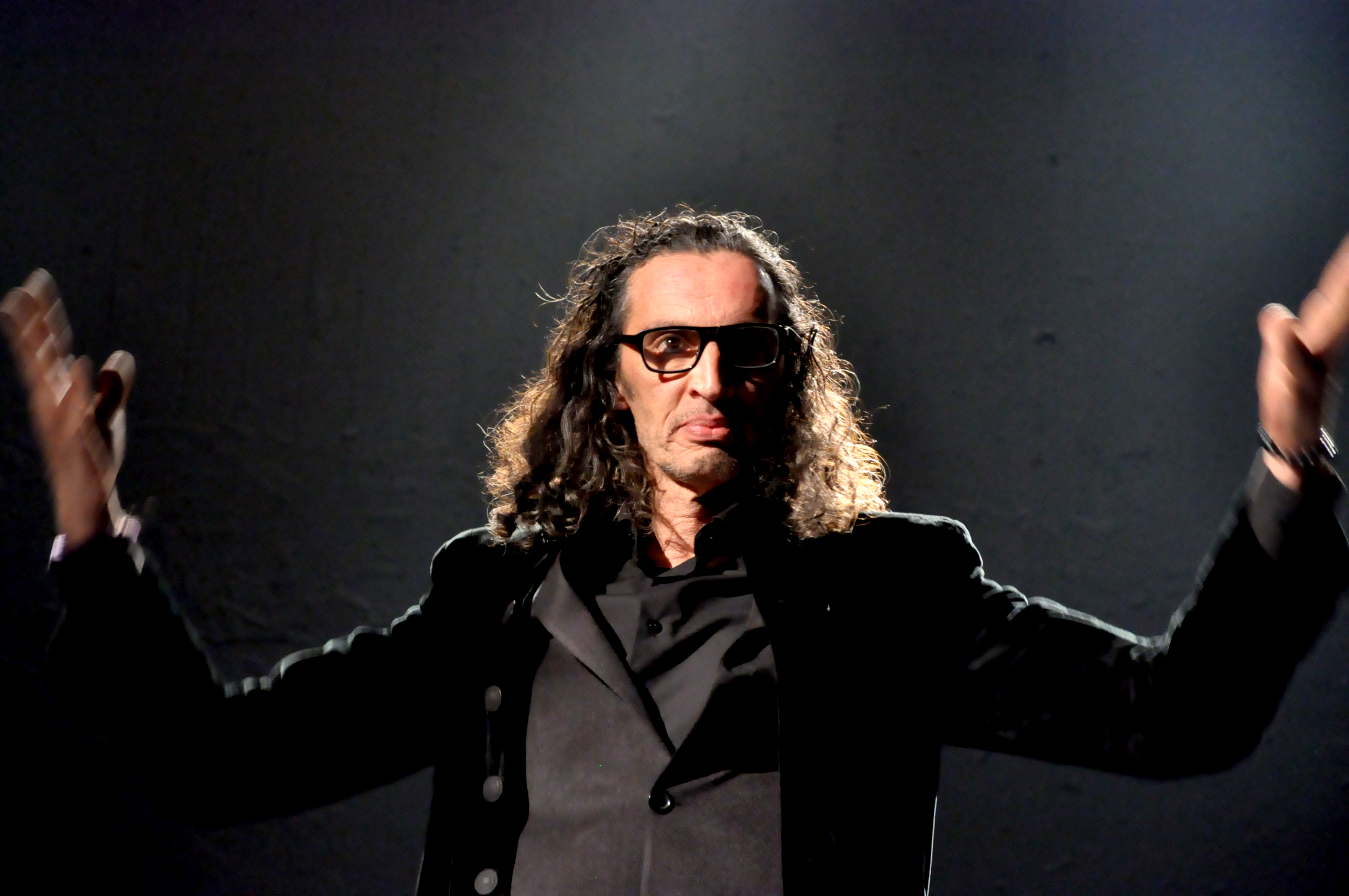 Photo du spectacle Délire